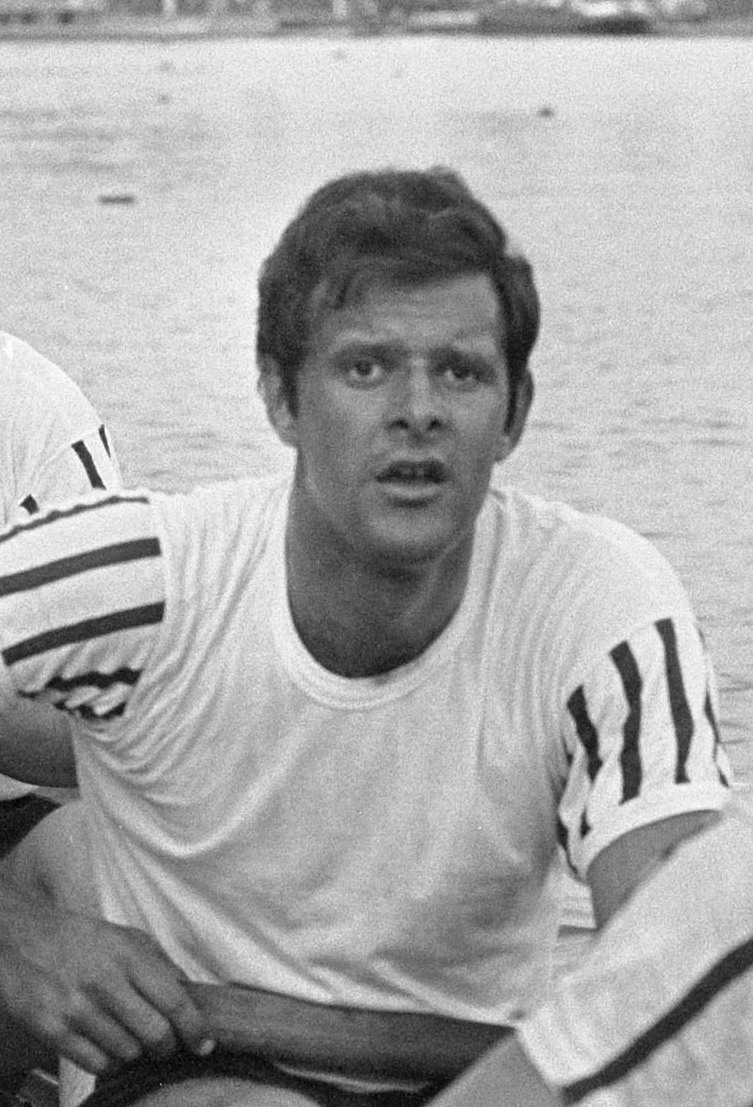 Nationale Roeikampioenschappen op de Bosbaan. Eric Niehe